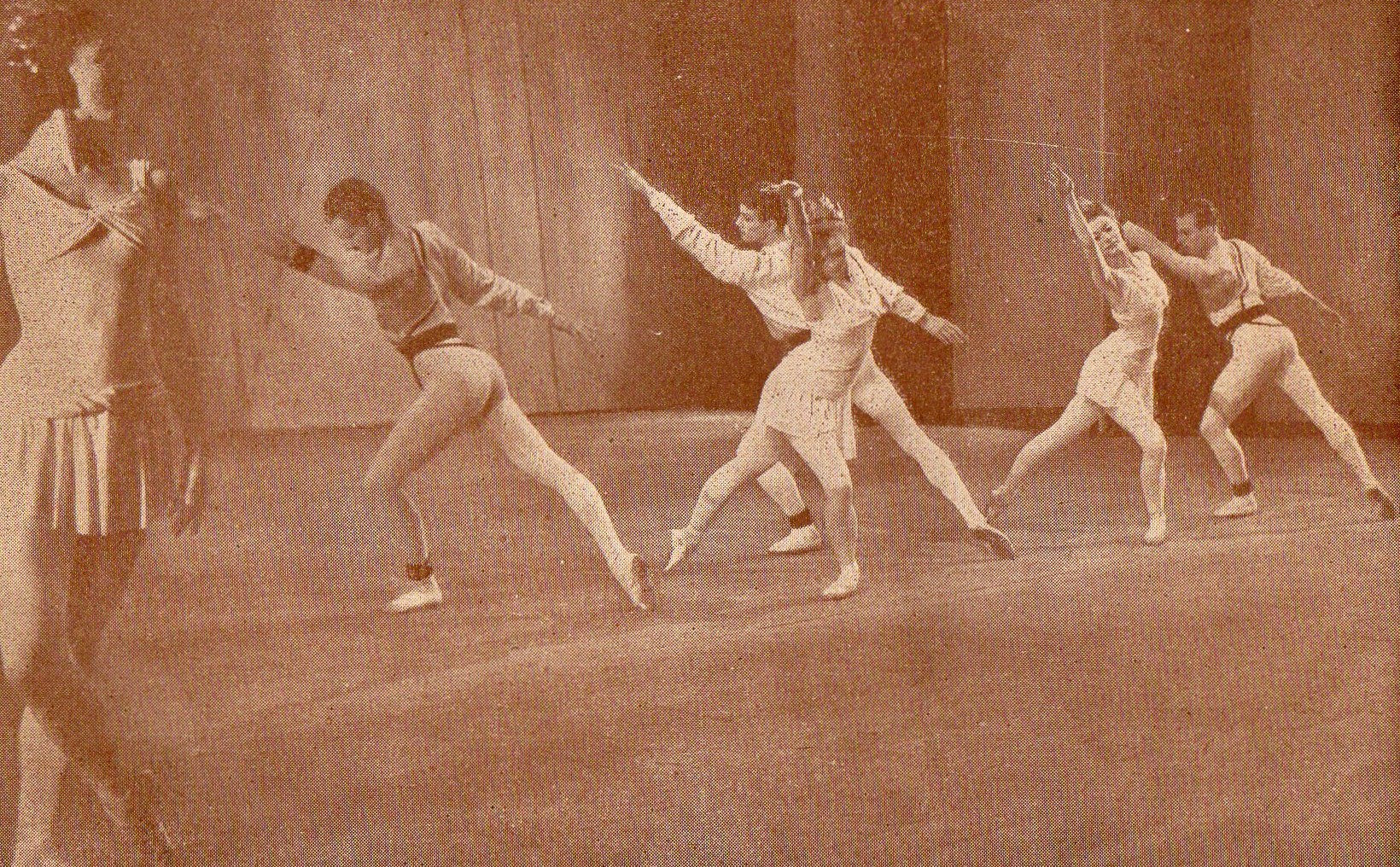 Zespół baletowy The Sadler's Wells Balet (Anglia) na występach gościnnych w Poznaniu jesienią 1947r. (Teatr Wielki).